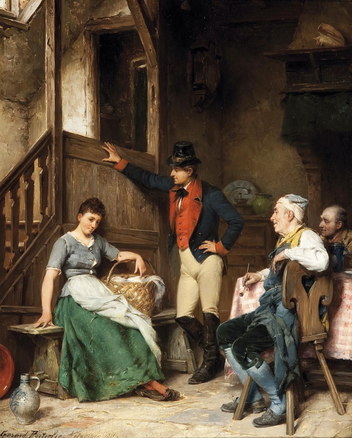 Entre deux feux